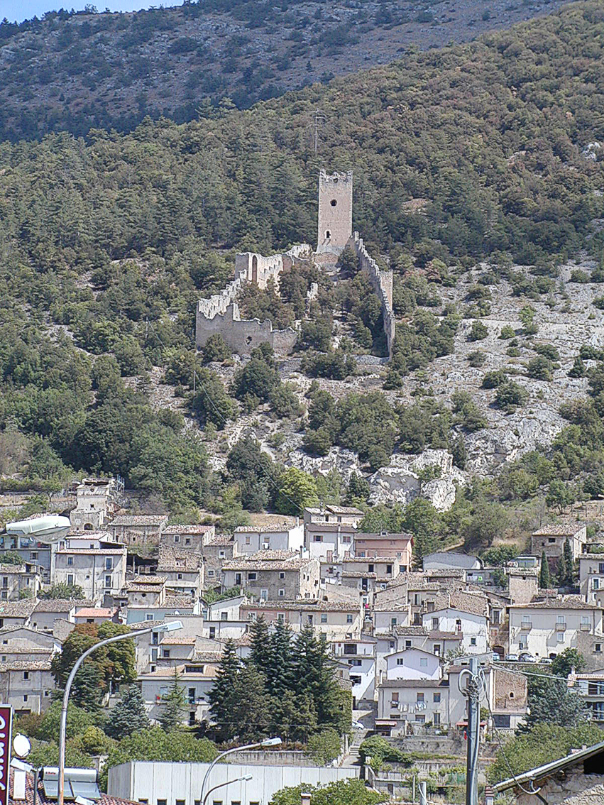 Il castello triangolare di San Pio